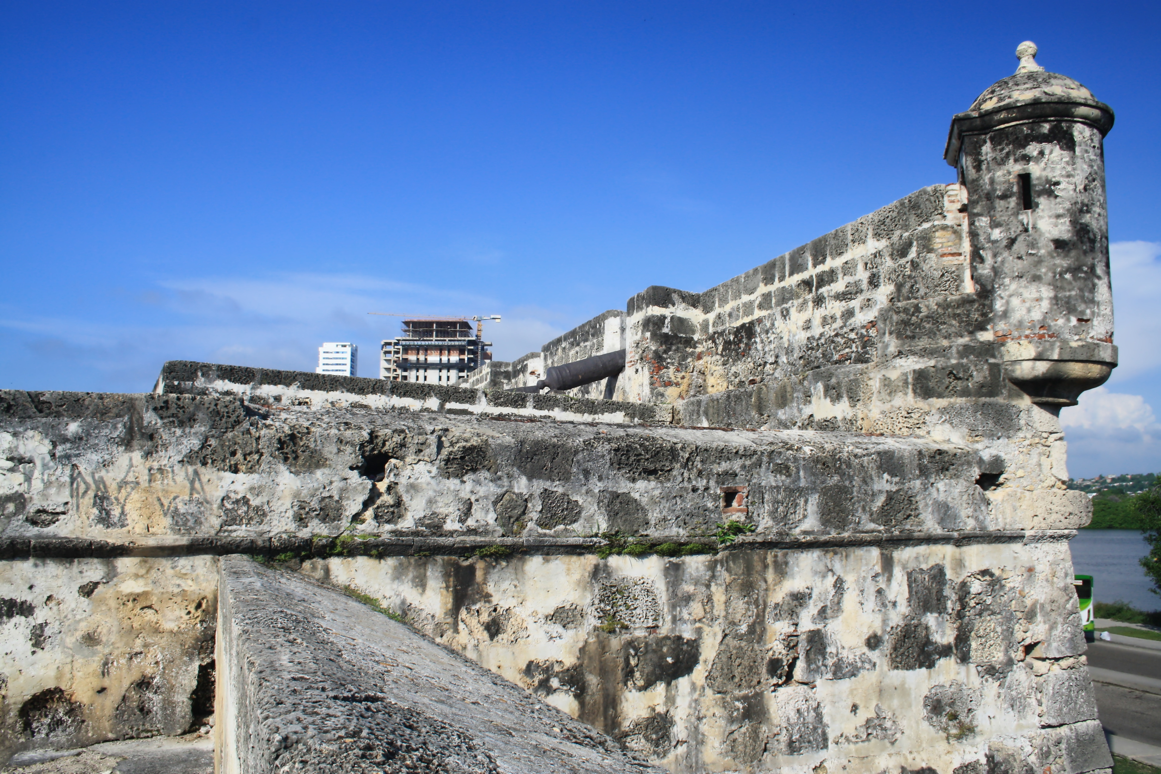 Baluarte de San Lucas